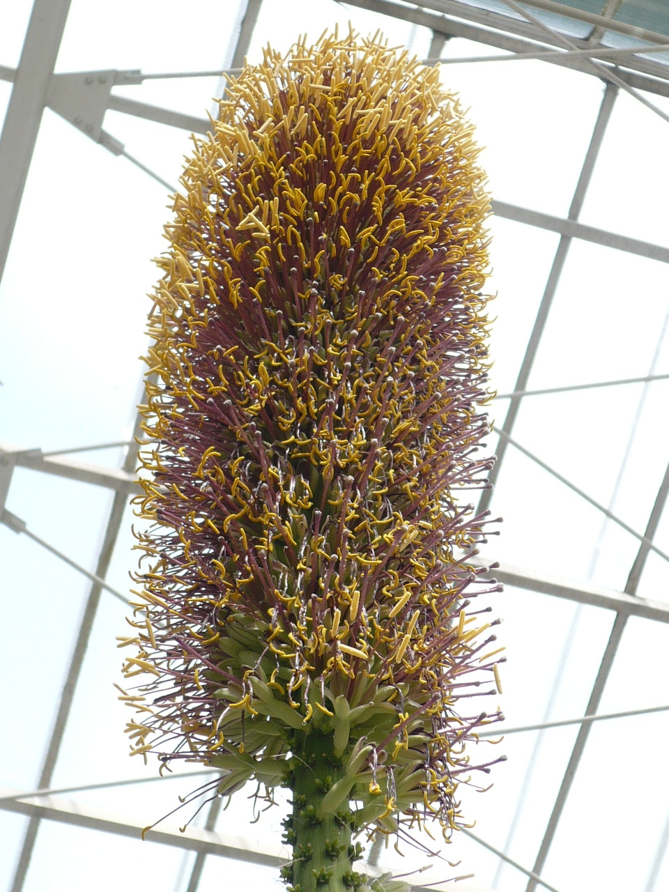 Blüte der Agave Victoriae_reginae